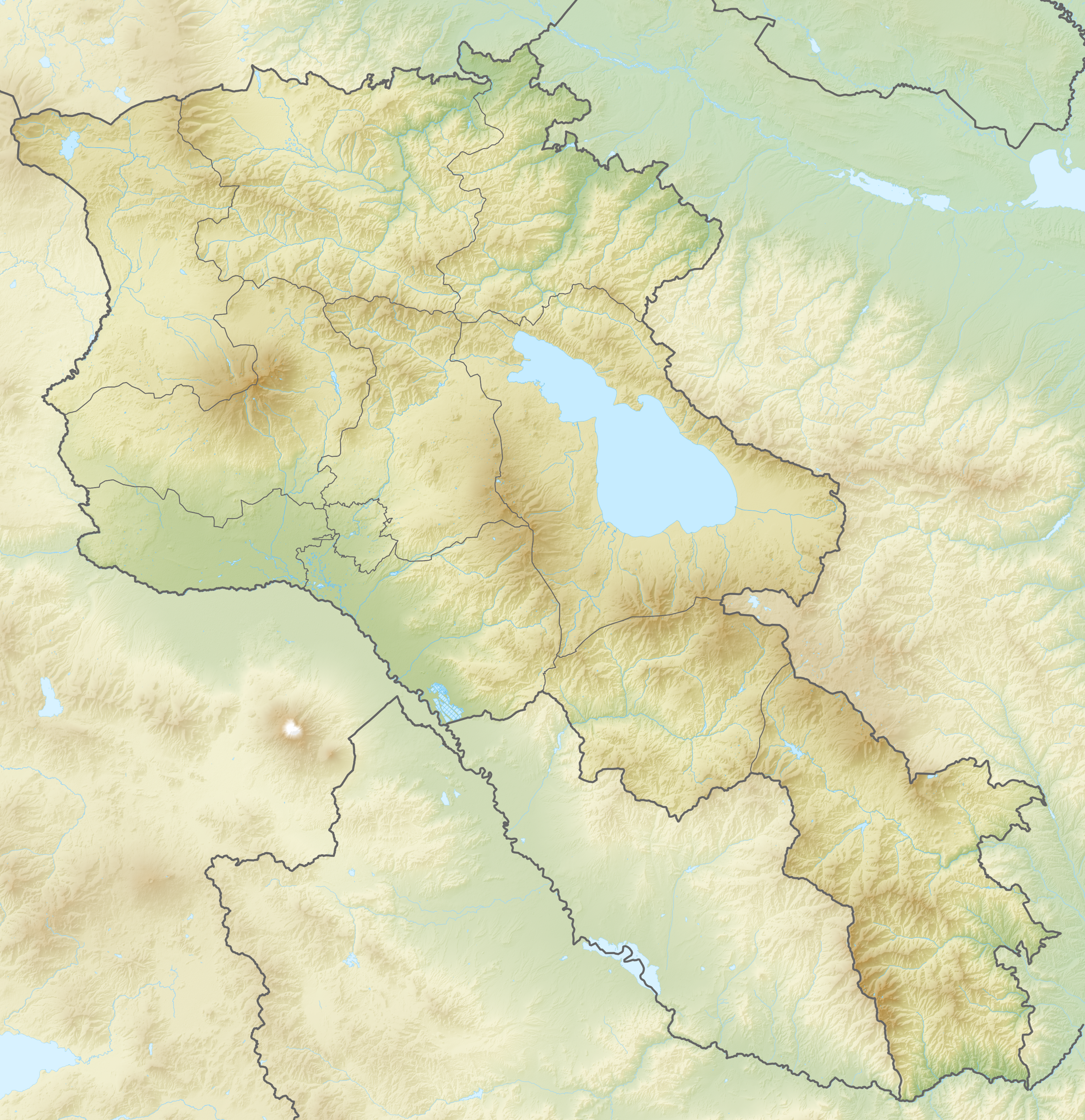 Reliefkarte Armenien Topographischer Hintergrund: NASA Shuttle Radar Topography Mission (public domain). SRTM3 v.2. Grenzen: Armenia adm location map.svg